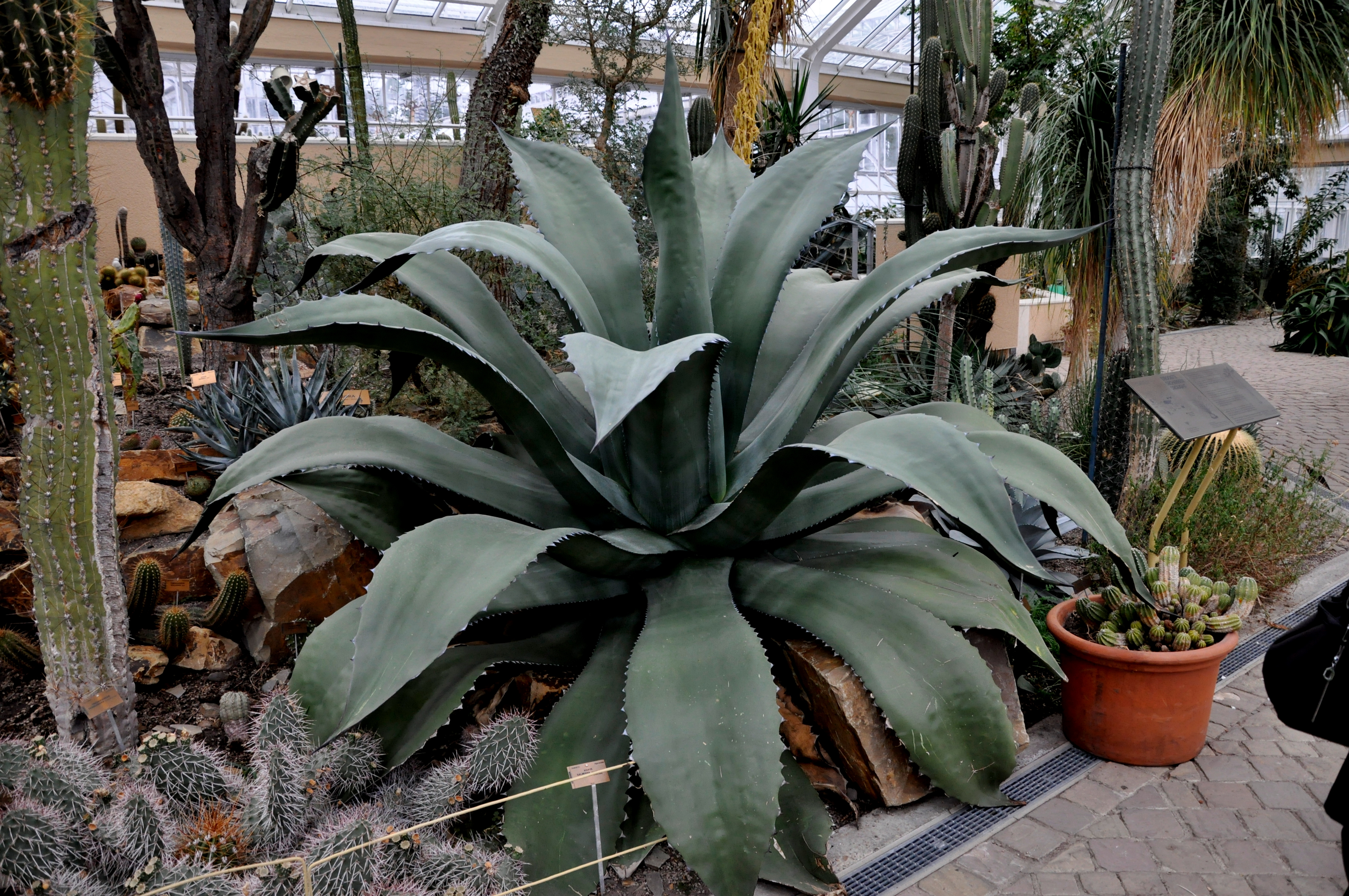 Agave salmiana (var. ferox) in de Nationale Plantentuin van België te Meise